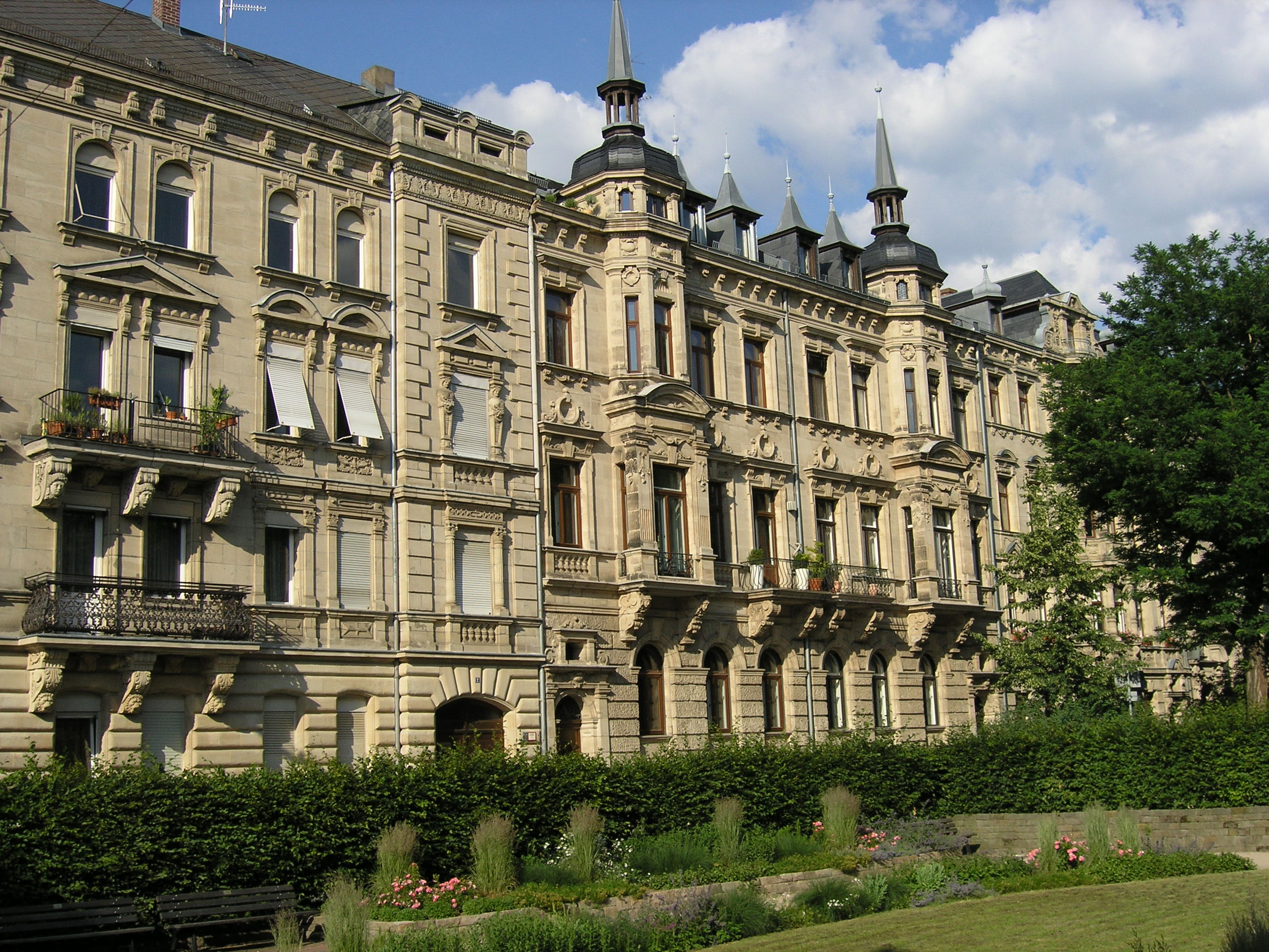 Hornschuchpromenade Fürth - die Gebäude sind im Stile des Historismus gestaltet.